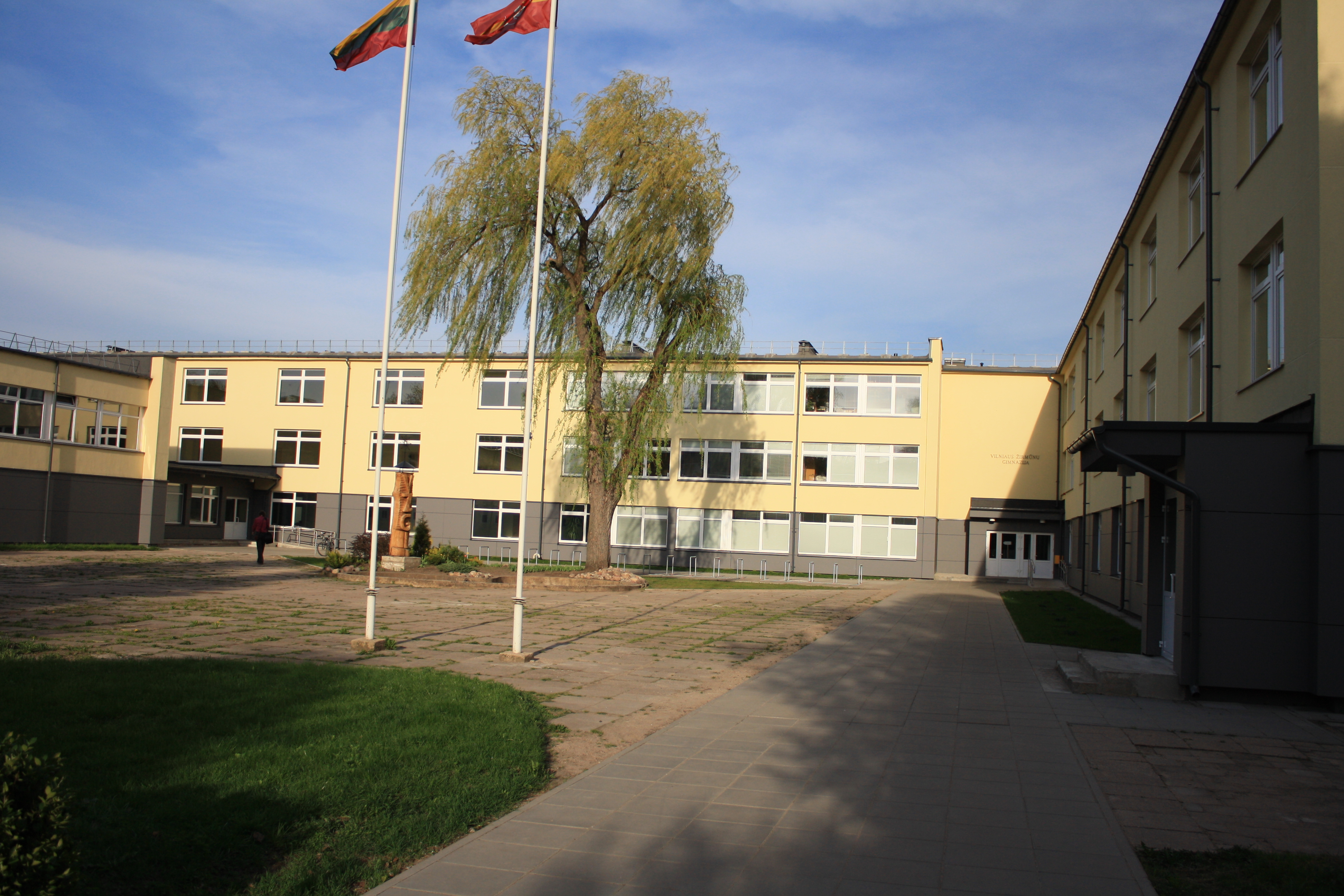 Vilniaus Žirmūnų gimnazija